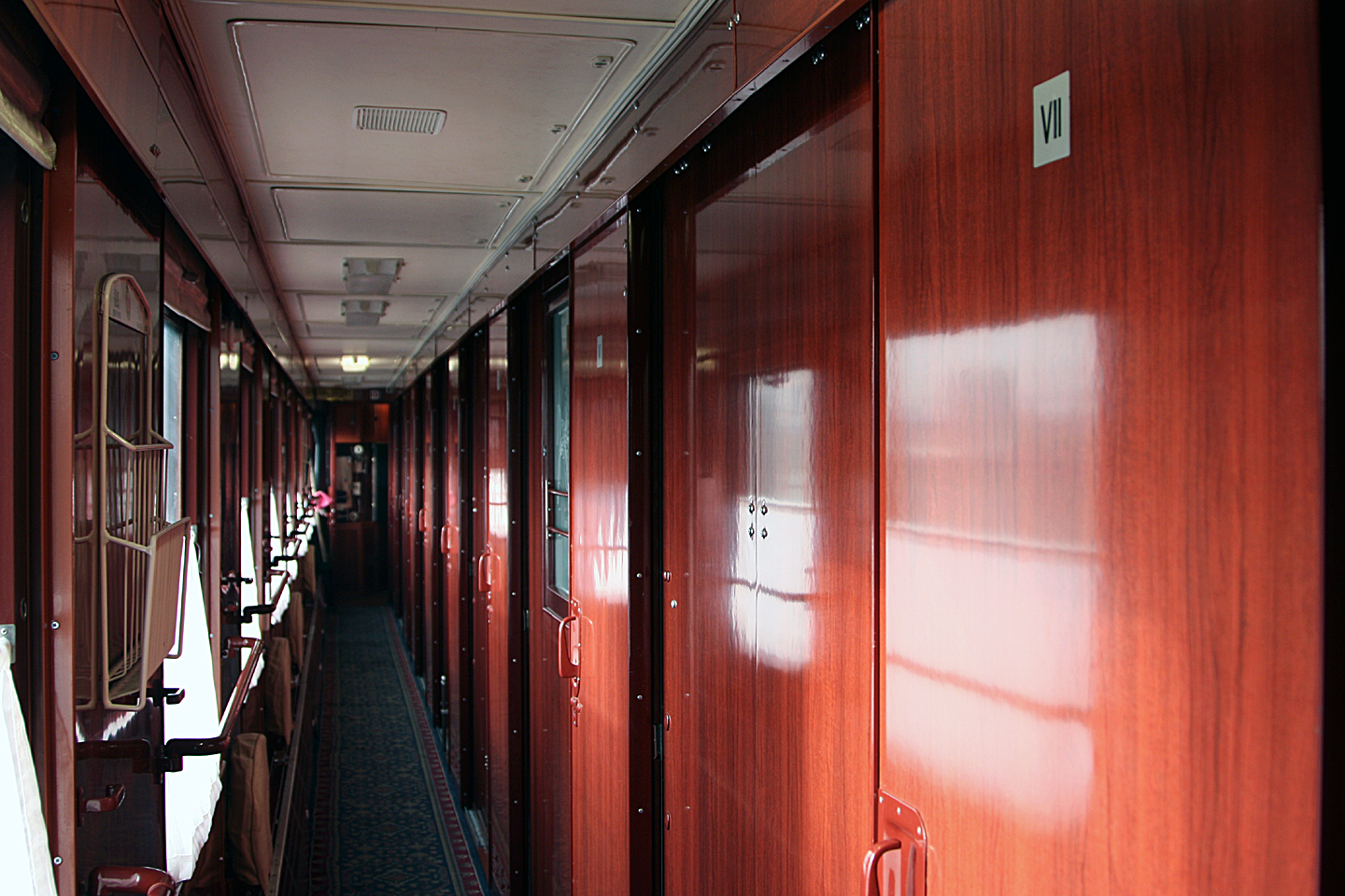 中国铁路19型客车车厢内部（RW19）